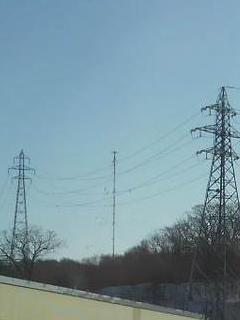 HBCラジオ,STVラジオの送信所。2014年11月に運用開始。